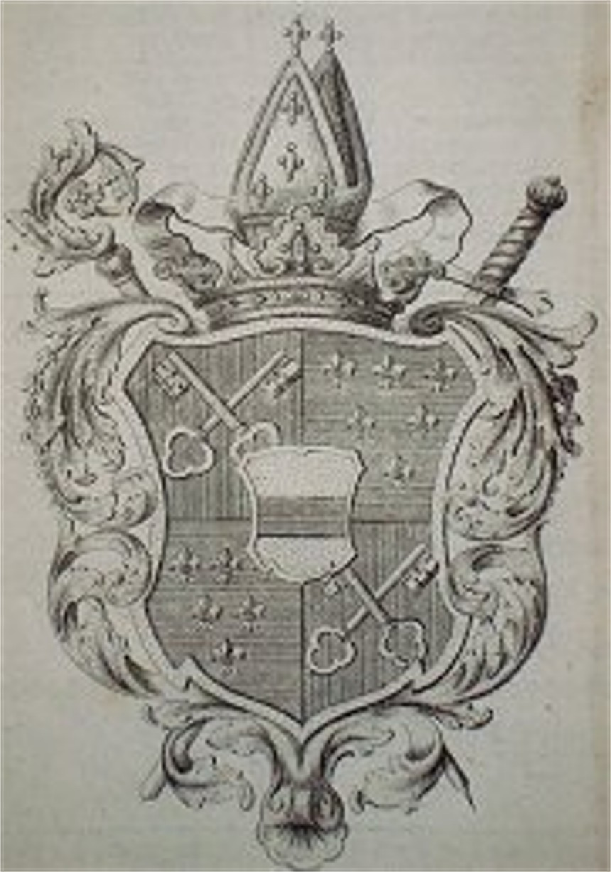 Wappen der Fürstpropstei Berchtesgaden unter Fürstpropst Cajetan Anton Notthafft von Weißenstein mit dem Notthafft'schen Familienwappen als Herzschild